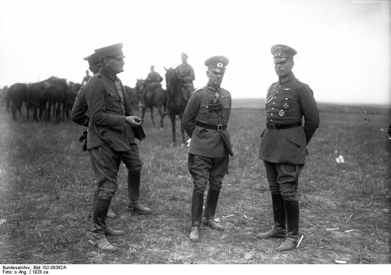 Generalleutnant Hasse, Otto